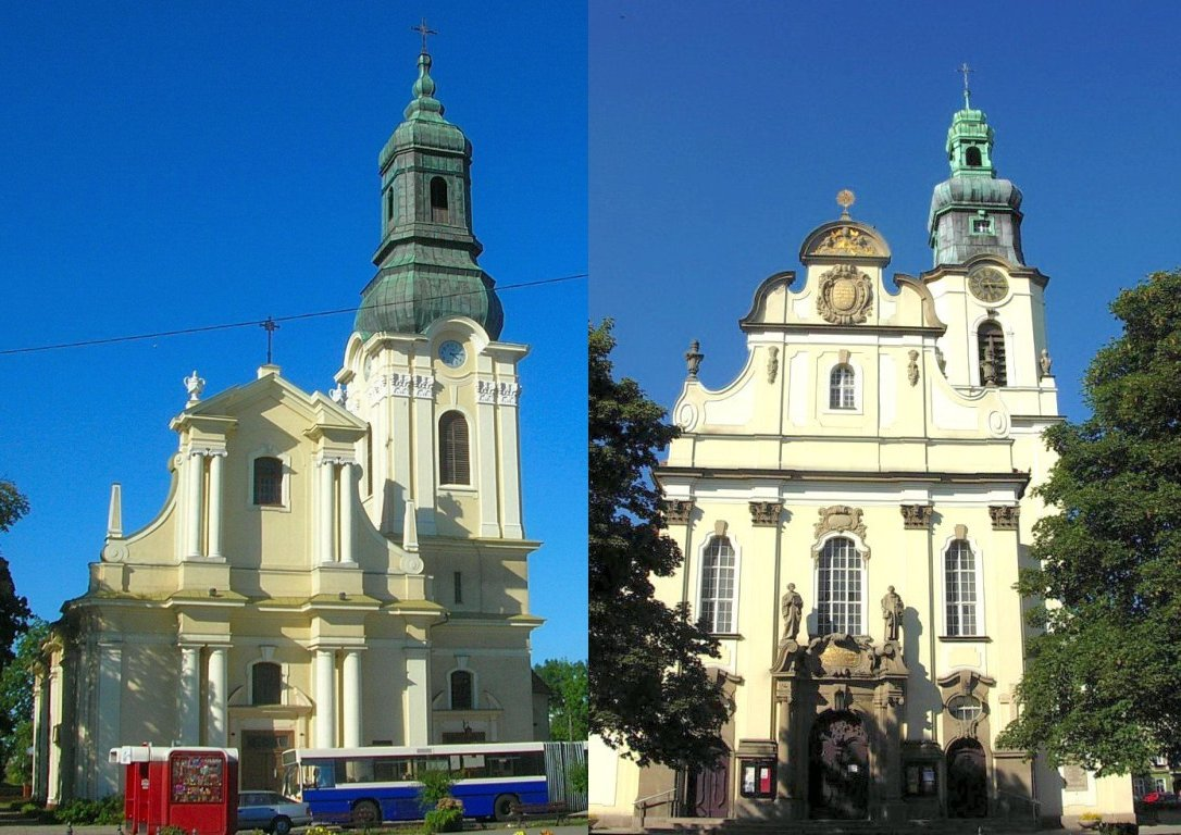 Kościoły Bydgoszczy: św. Mikołaja i Najświętszego Serca Jezusa